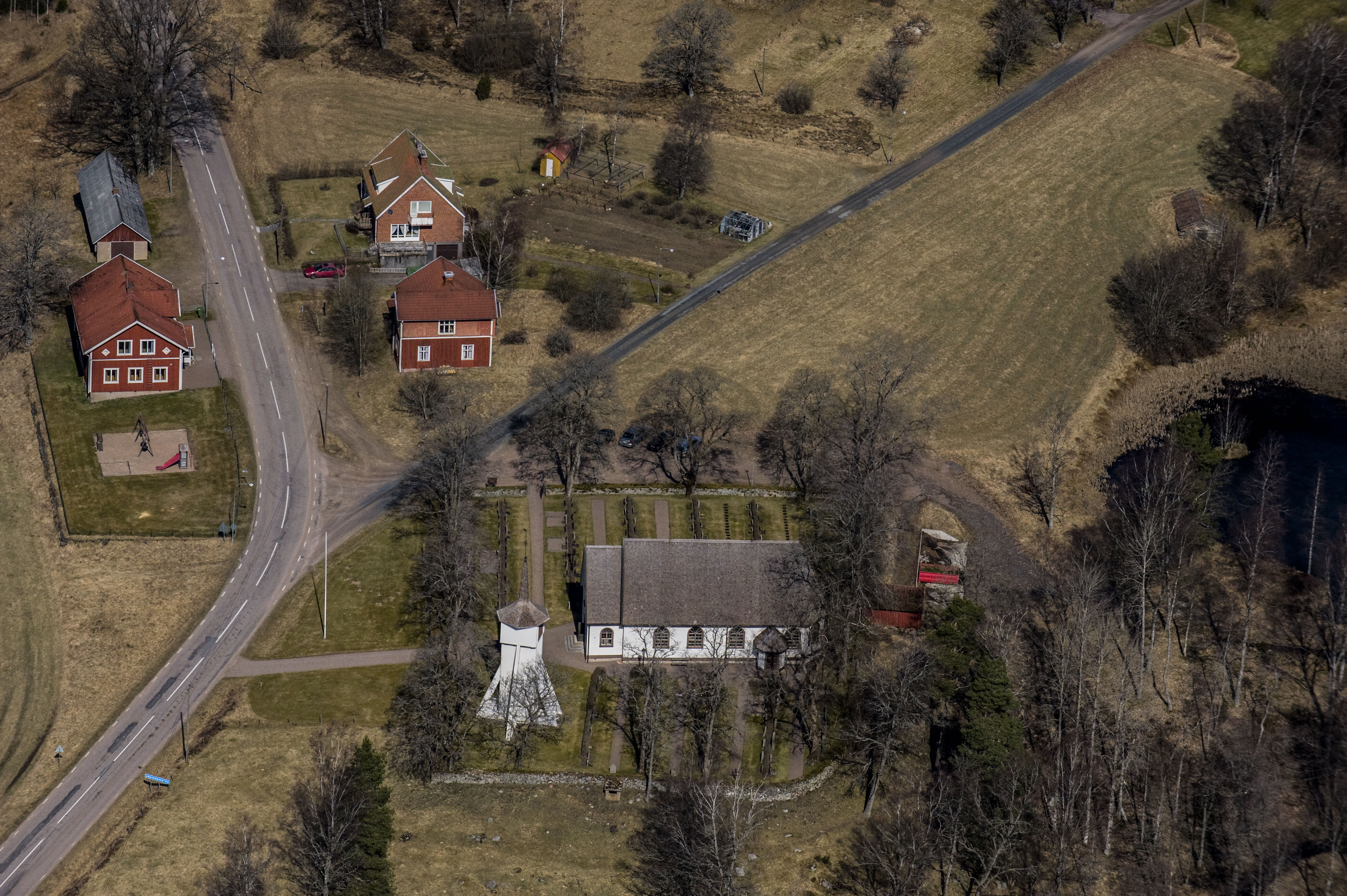 Angerdshestra kyrka från luften